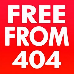 Protest gegen den Missbrauch der Fehlermeldung 404 zu Zwecken der Zensur